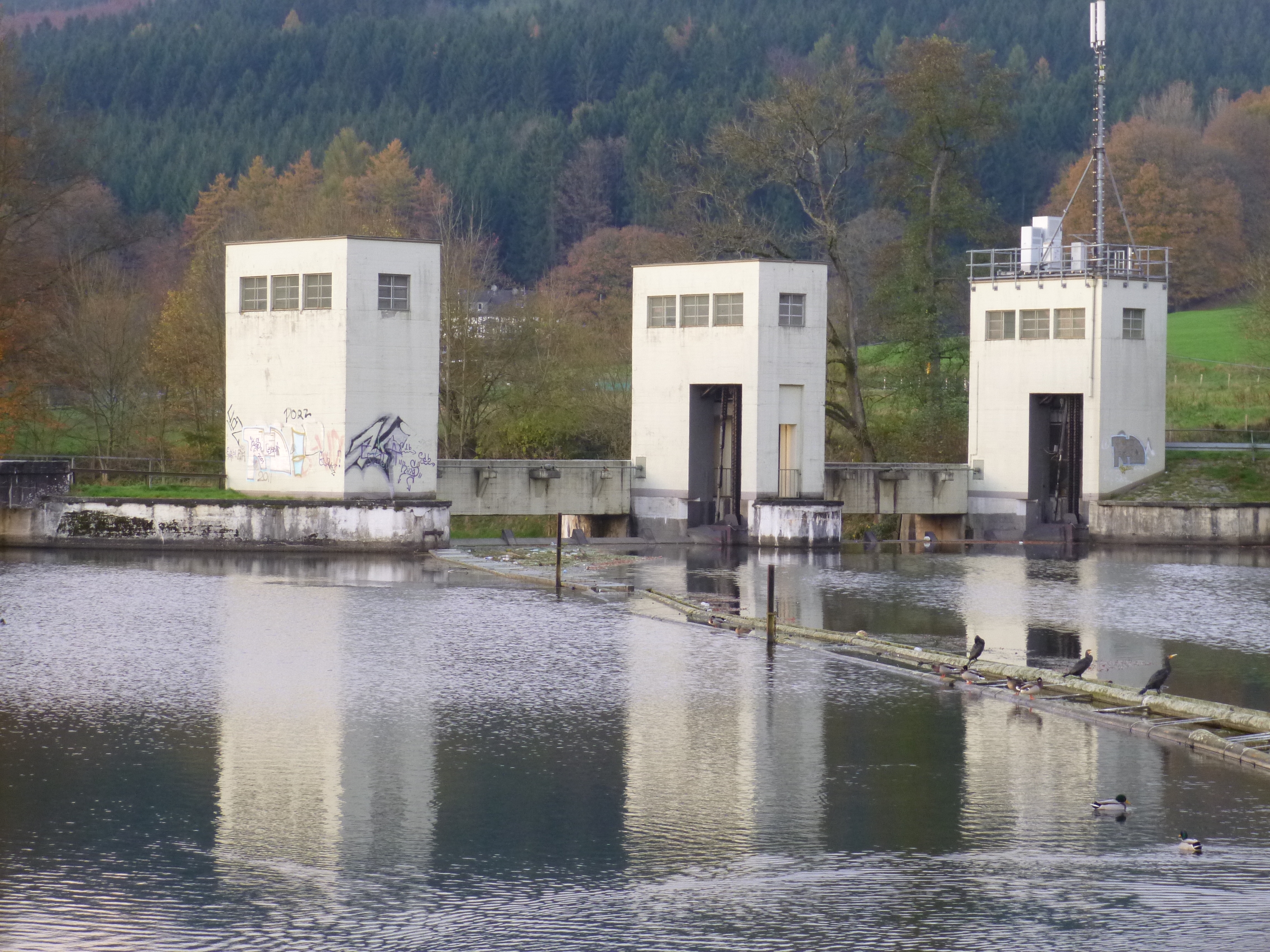 Stauanlage Ehreshoven I in Loope